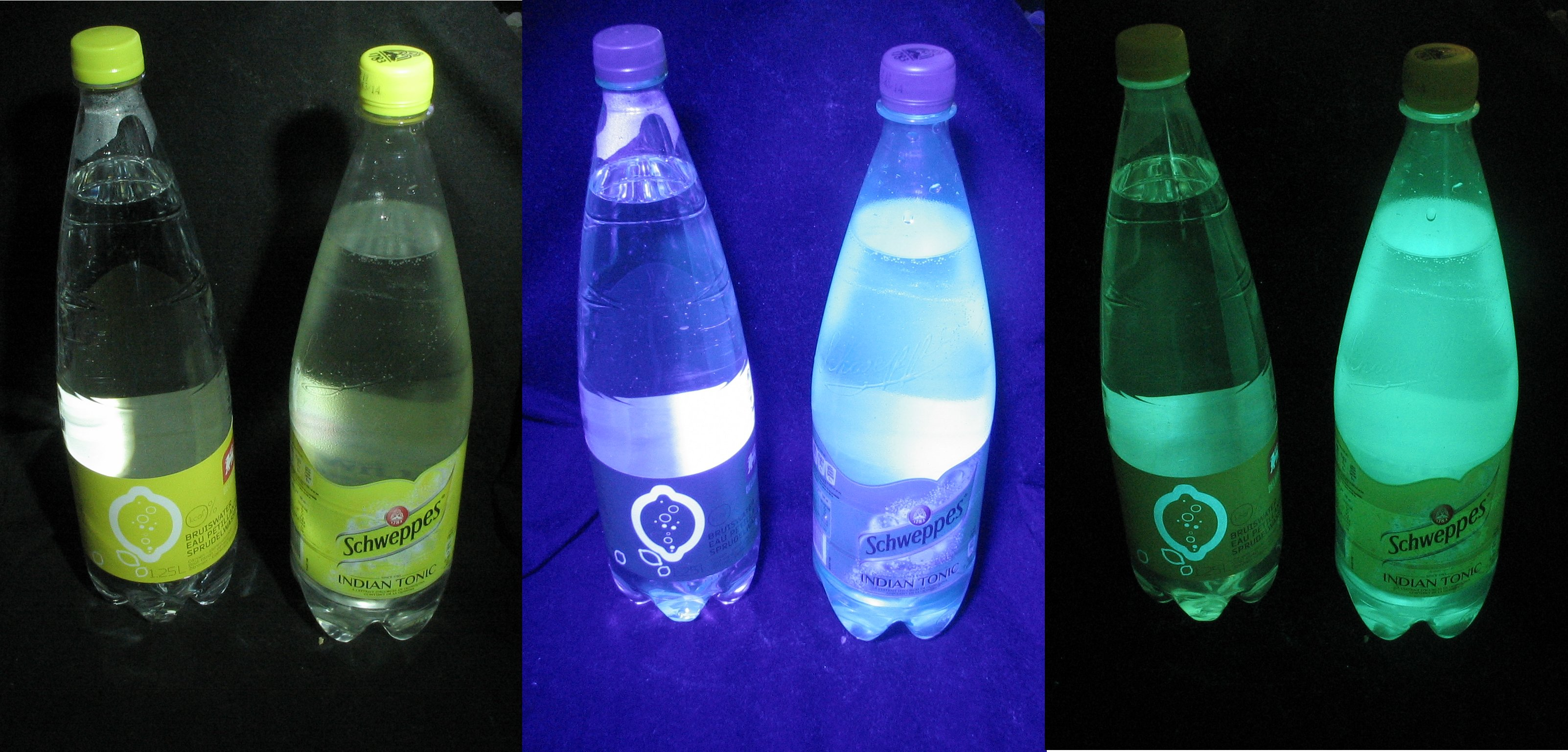 Fluorescence du Schweppes Indian Tonic (à l'extrait d'écorce de quinquina (quinine)) comparée à l'absence de fluorescence d'une eau pétillante goût citron Delhaize (LEDs blanches; LEDs UV; LEDs UV filtre jaune)